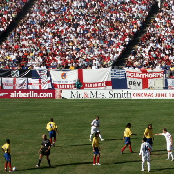 Partido amistoso de la Selección Colombia frente a Inglaterra. Reynaldo Rueda dirigió a Colombia en el 2005 en un Amistoso contra Inglaterra en el Giants stadium, Rutherford, NJ.